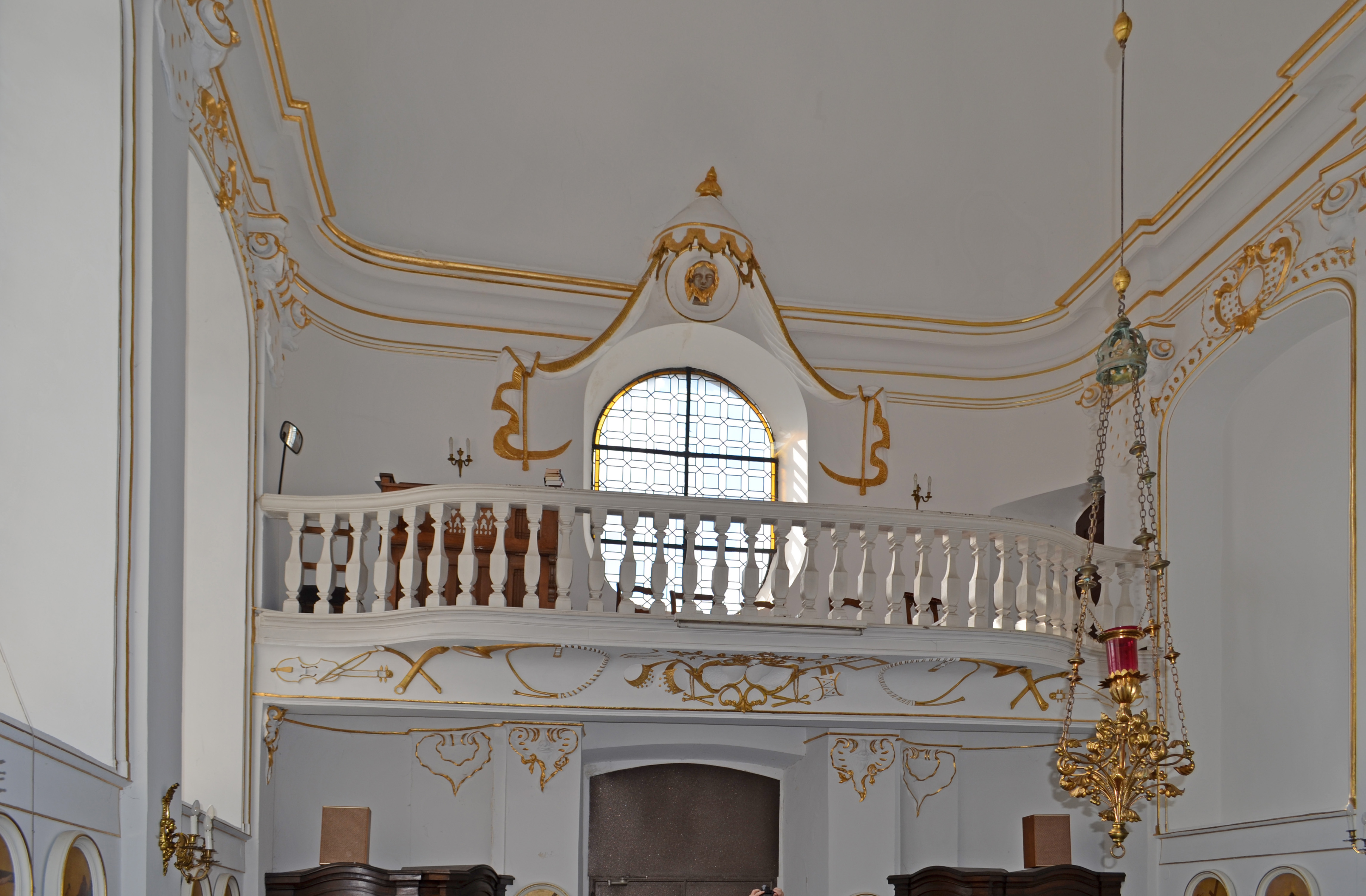 Sankt Johannes-Baptist Enthauptungskapelle in Eupen-Nispert, Orgelempore